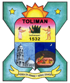 Escudo del Municipio de Tolimán